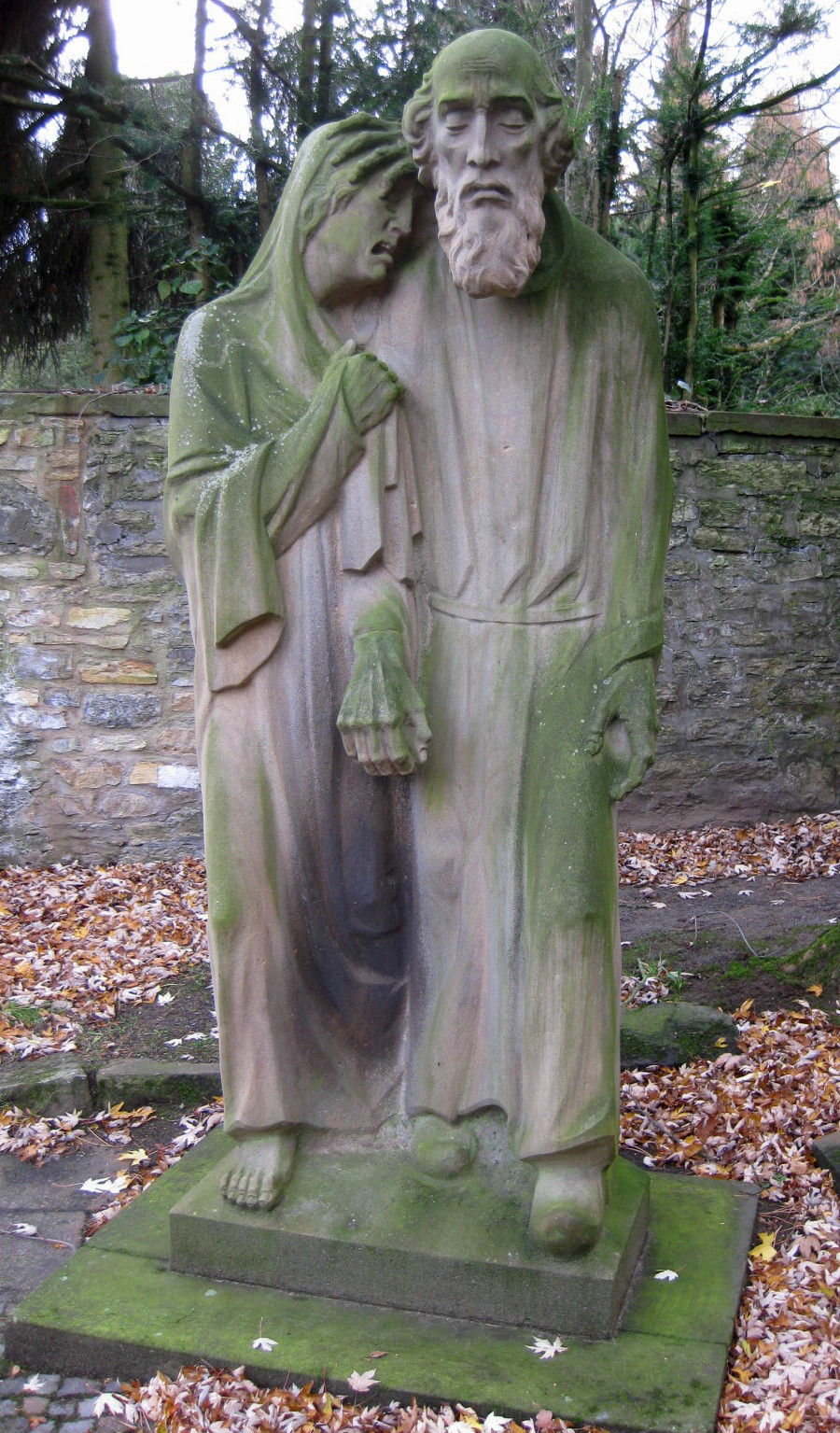 Skulptur „Leidensweg“ (1951) auf dem Jüdischen Friedhof am Johannisfriedhof Osnabrück von Joseph Krautwald